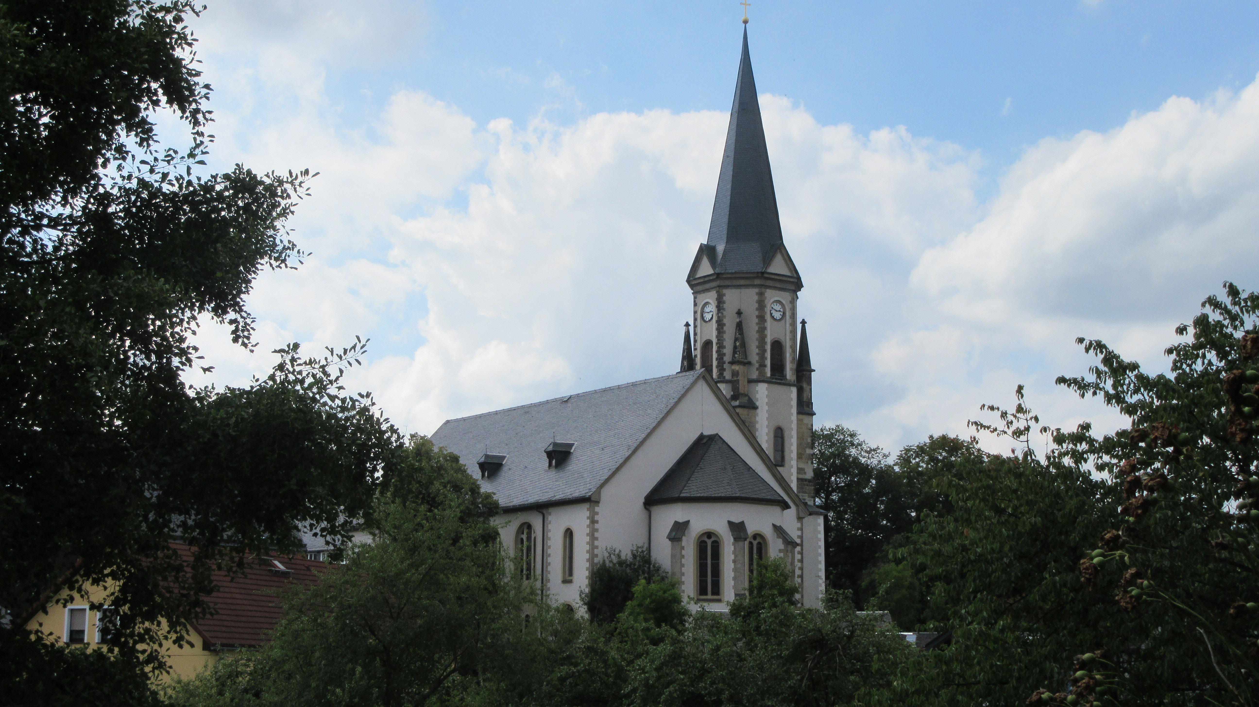 Die evangelisch-lutherische Kirche zum Heiligen Kreuz Lengefeld, vom Friedhof aus gesehen.